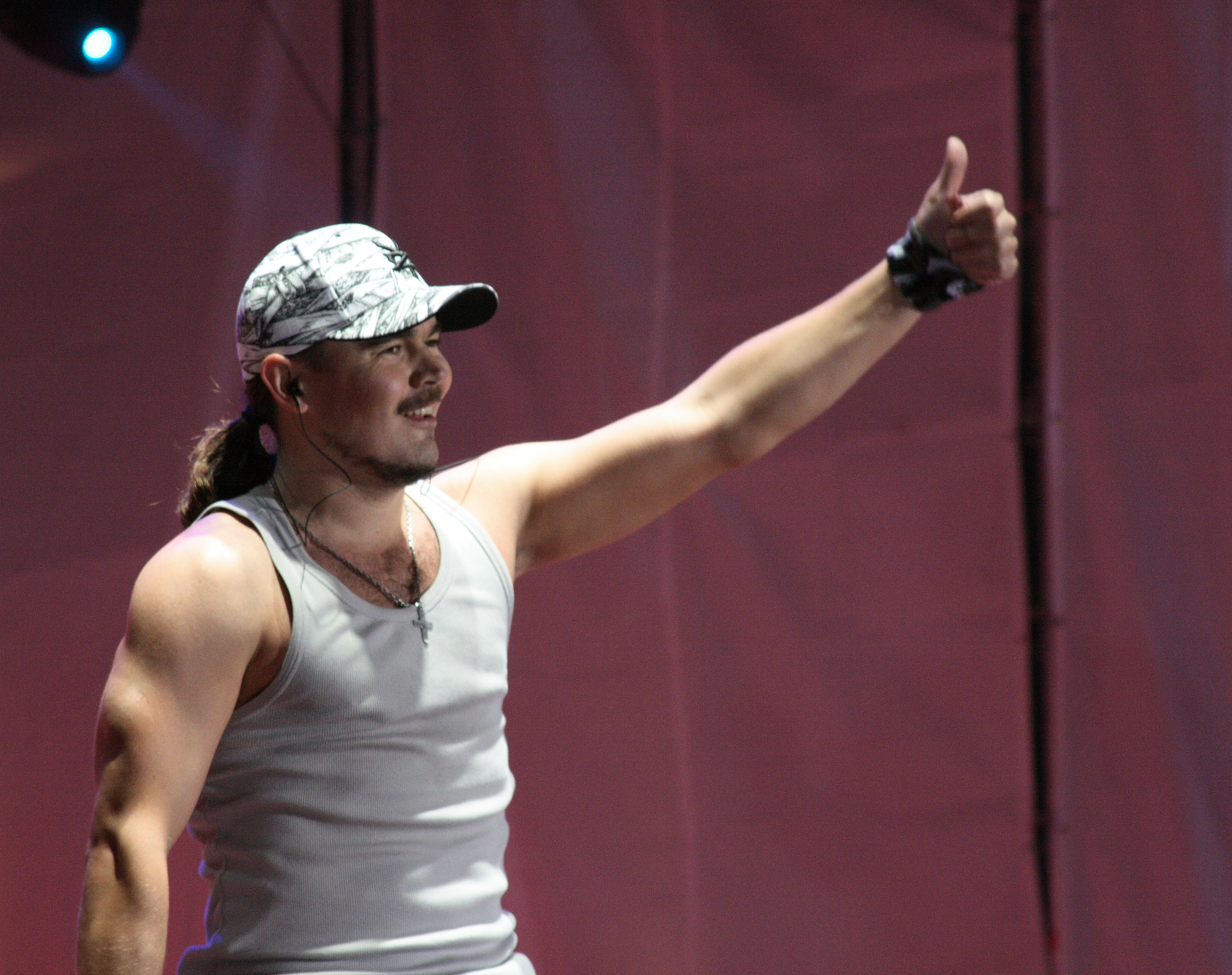 Олег «Фагот» Михайлюта, рэпер из Украины